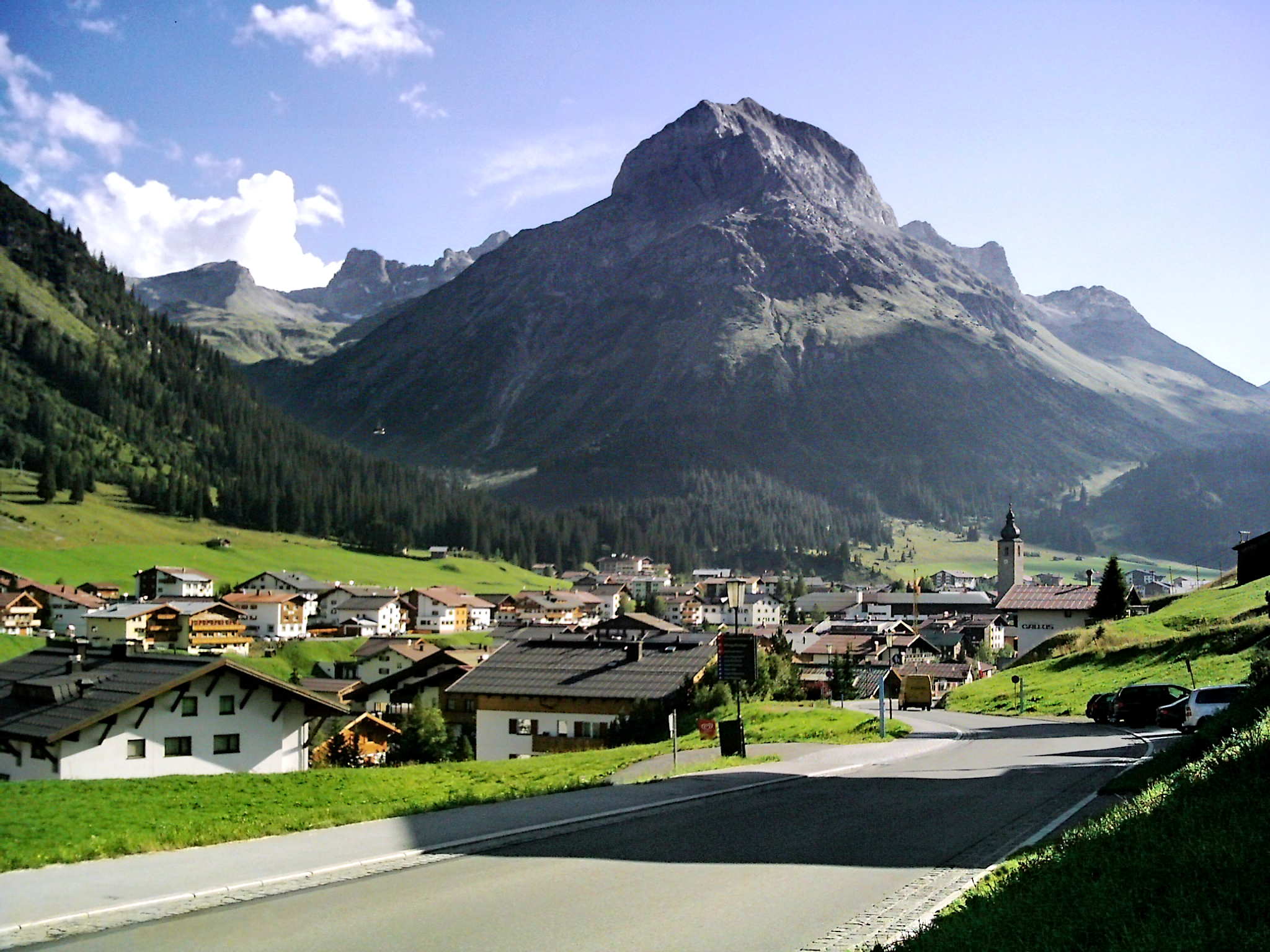 Omeshorn (2557 m) südlich über Lech am Arlberg im Lechquellengebirge in Vorarlberg, links des Omeshorns führt das Tal des Zürsbaches nach Zürs und weiter zum Flexenpass, ganz links führt die Seilbahn auf den Rüfikopf (Gondel auszumachen).